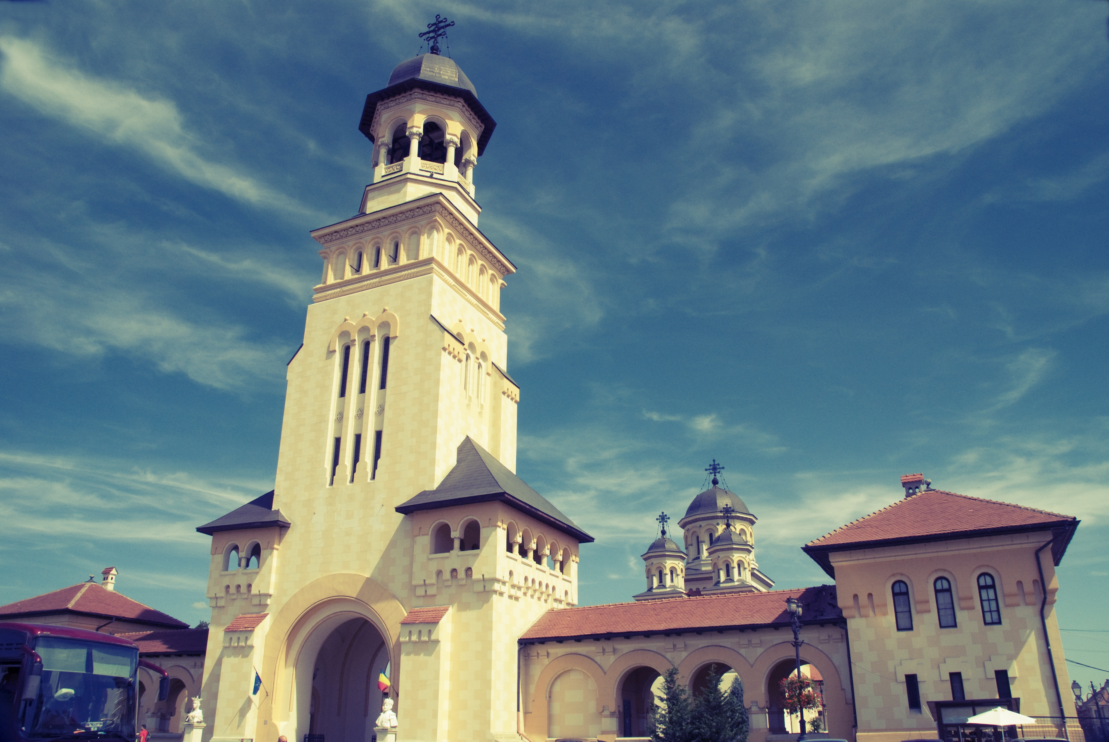 Intrarea la Catedrala Reintregirii Neamului, Clopotnita